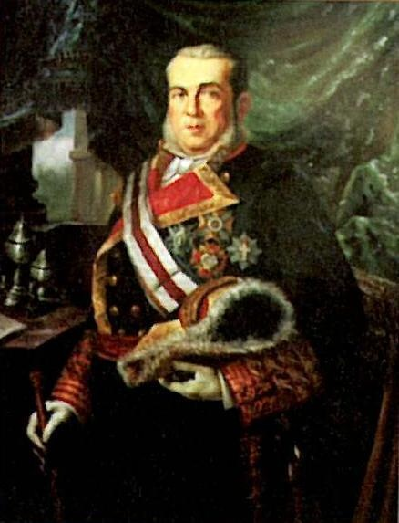 Retrato del Almirante Hernández-Pinzón